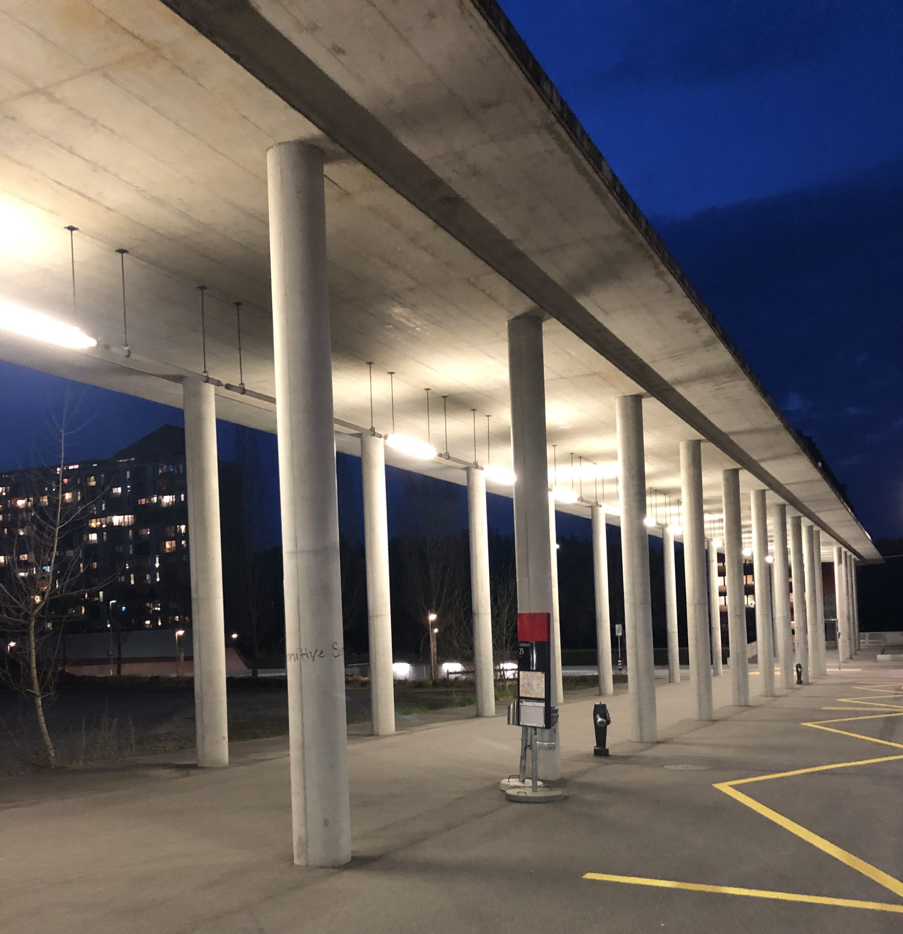 Kolonade am Baufeld 3 Brünnen